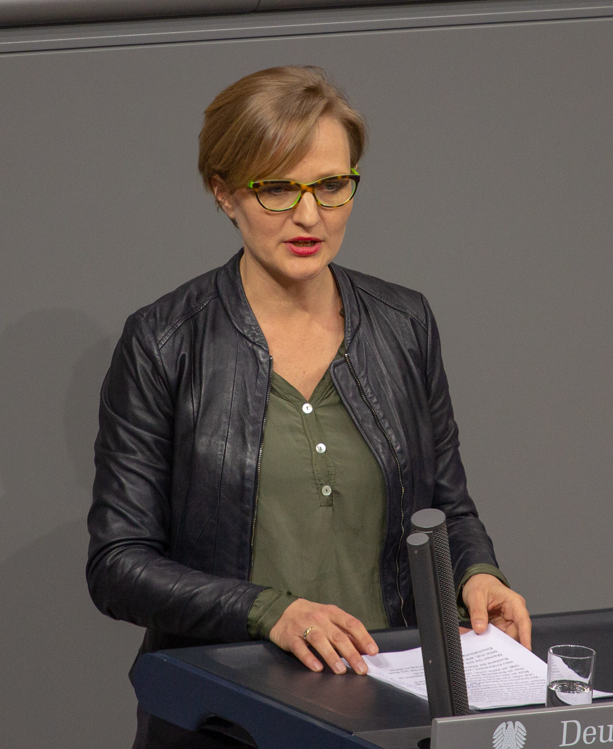 Franziska Brantner, Mitglied des Deutschen Bundestages, während einer Plenarsitzung am 11. April 2019 in Berlin.